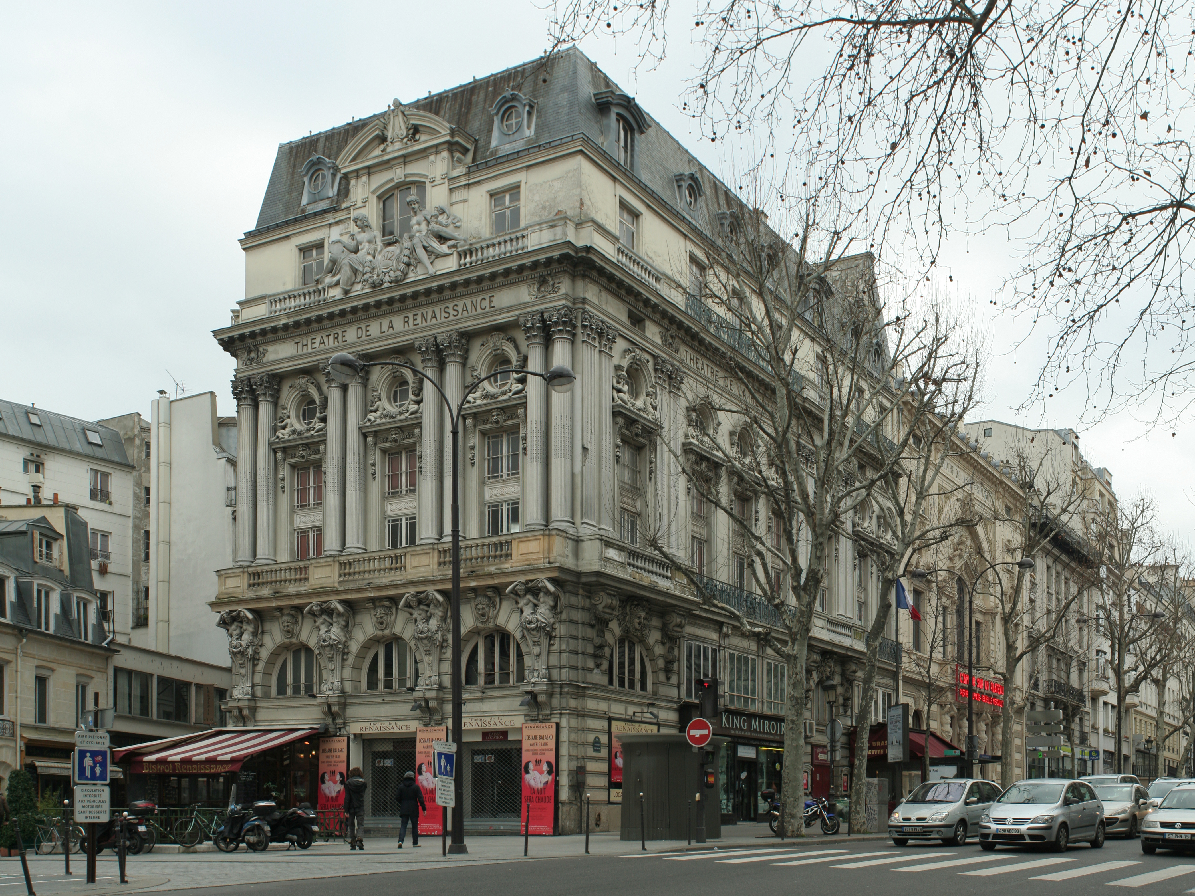 Théâtre de la Porte-Saint-Martin, boulevard Saint-Martin, Paris 10e.